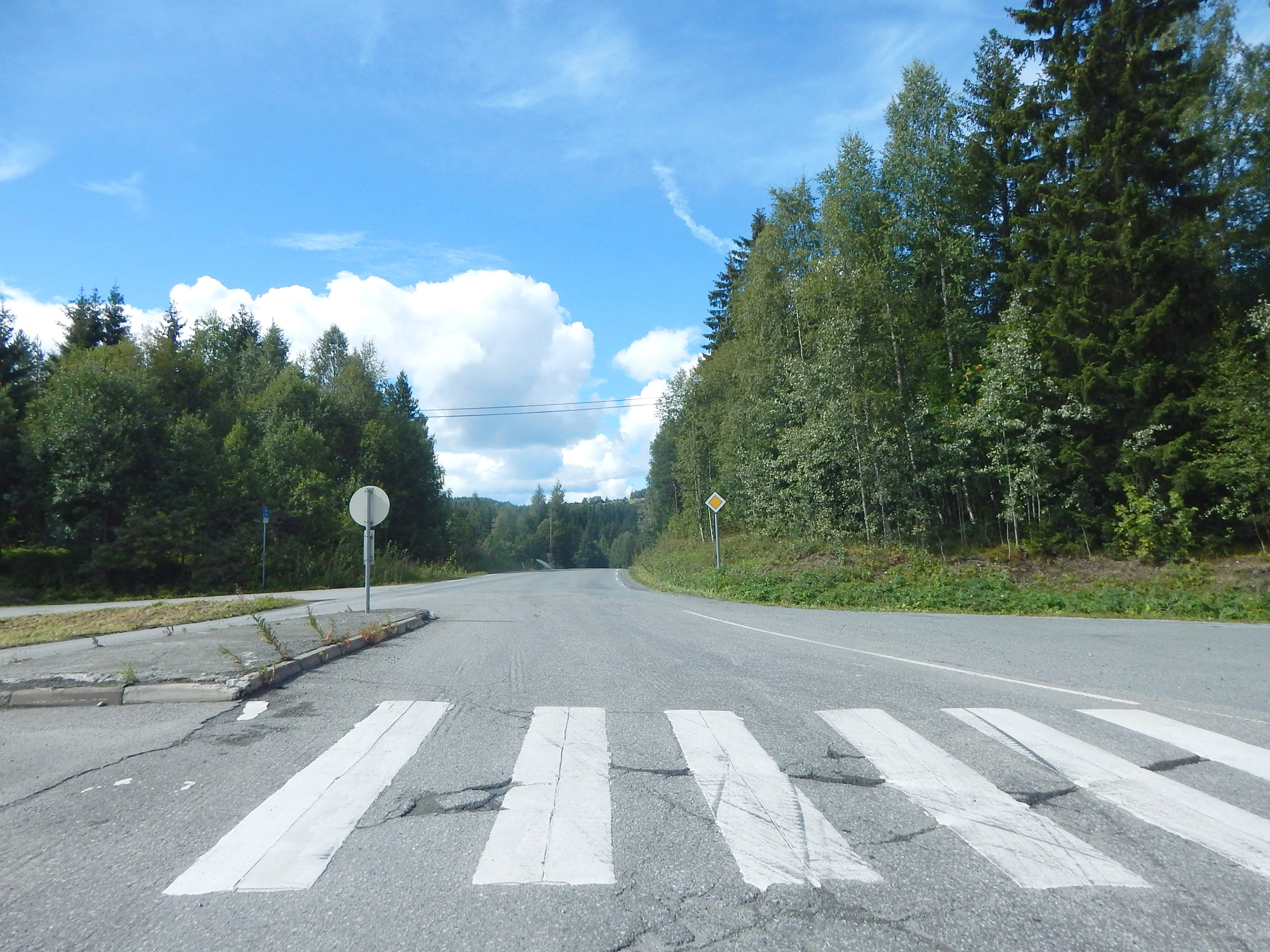 Skumsjøvegen (fylkesvei 2398, tidl. 148) sett fra Gjøvikvegen